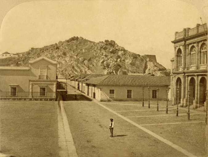 Plaza frente al Teatro Municipal de Santiago (1860. Al fondo el cerro Santa Lucía.)